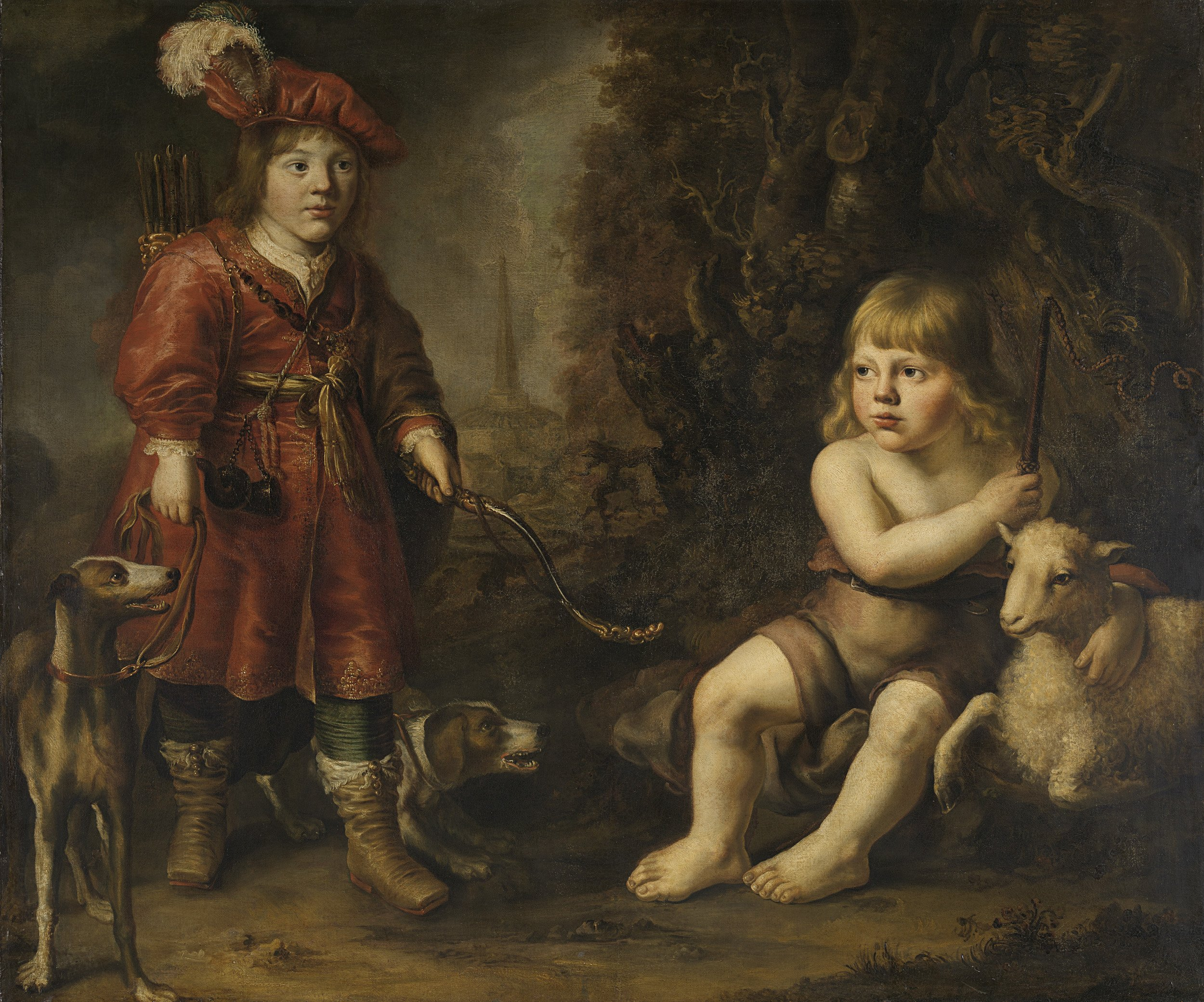 Portretten van twee jongens in een landschap. De een is gekleed als jager, met pijl en boog en jachthonden. De ander is afgebeeld als Johannes de Doper (of herder?), slechts gekleed met een doek om de middel, met de arm over een schaap en een zweep in de hand.